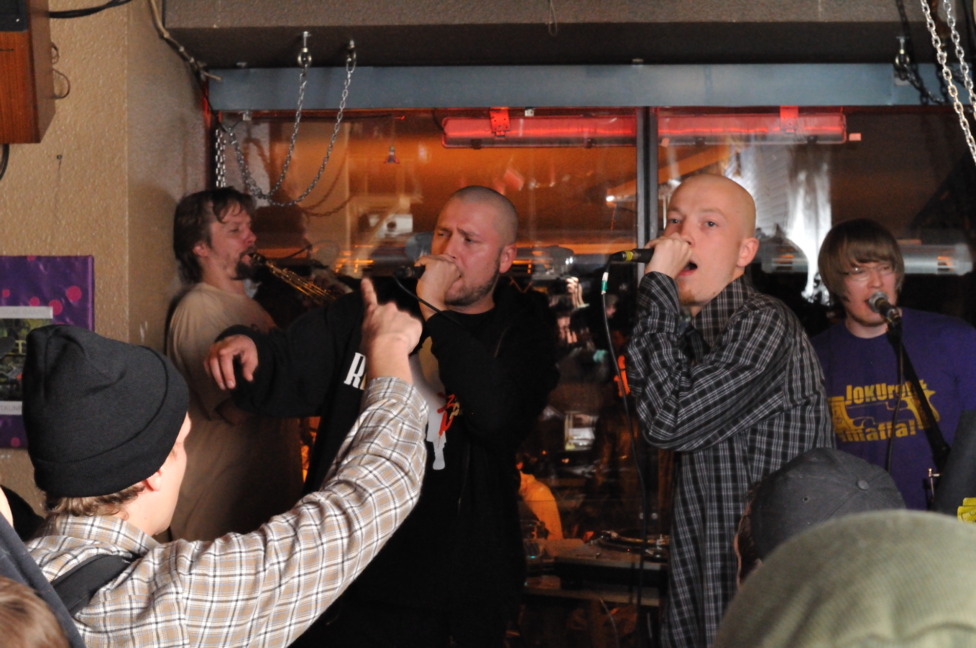 Vasemmalta oikealle: Getto-Aki, Hannibal, Edorf ja Tiskijukkapekka keikalla Oululaisessa baarissa Never Grow Old 11.9.2009.